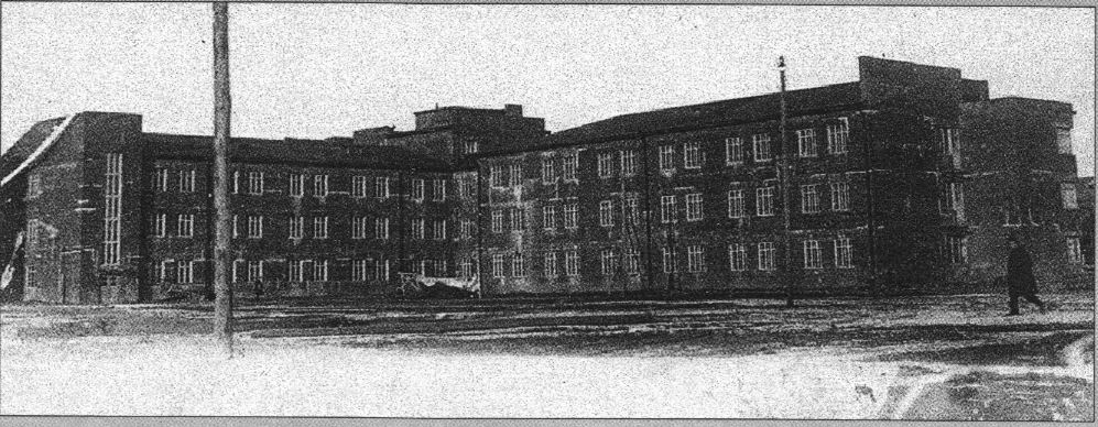 Інтэрнат БПІ на даваенным фота